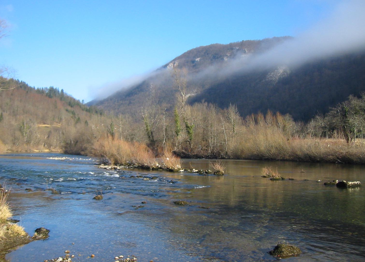 River Sava Bohinjka, Slovenia photo:Ziga 11:59, 16 April 2007 (UTC)